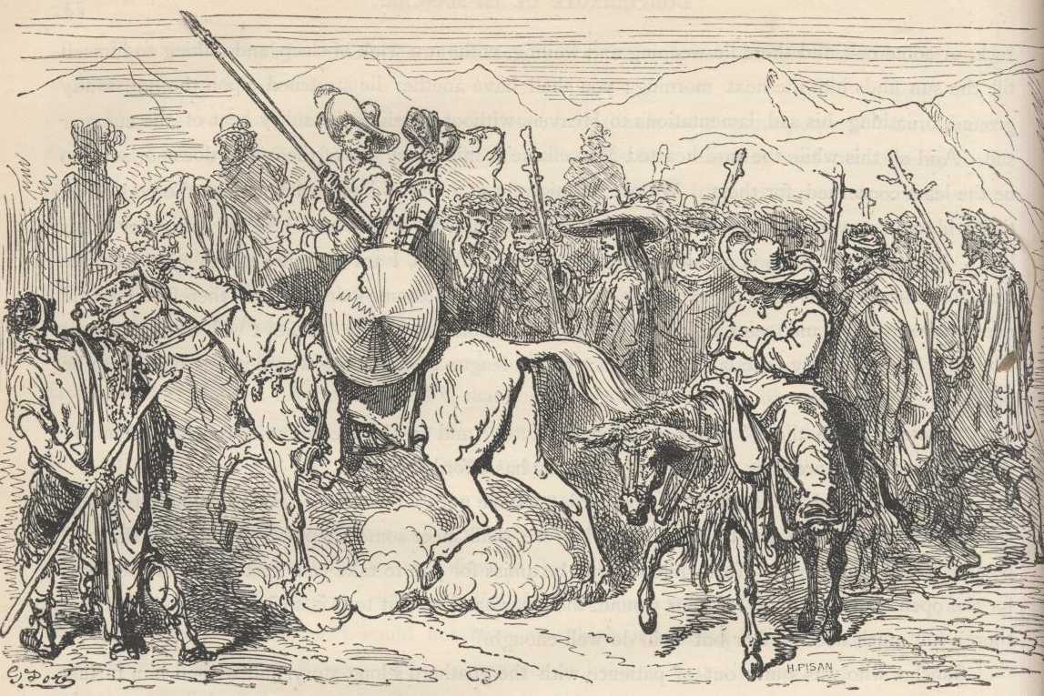 Dom Quixote dirige-se ao funeral de Crisóstomo junta mente com um grupo de outrs personagens que vão a cavalo ou a pé